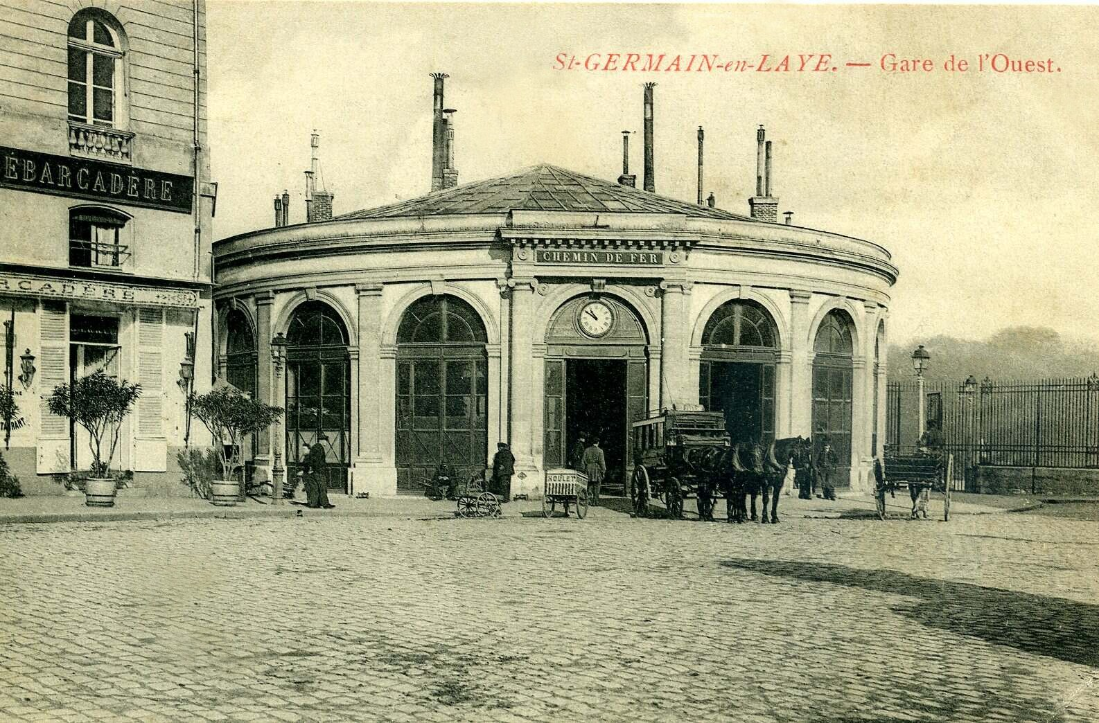 La gare des Chemins de fer de l'Ouest à Saint-Germain-en-Laye vers 1900 (Yvelines - France) (carte postale ancienne)